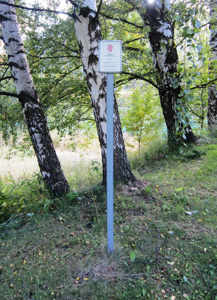 Kvam gamle kirkegård (Nord-Fron)